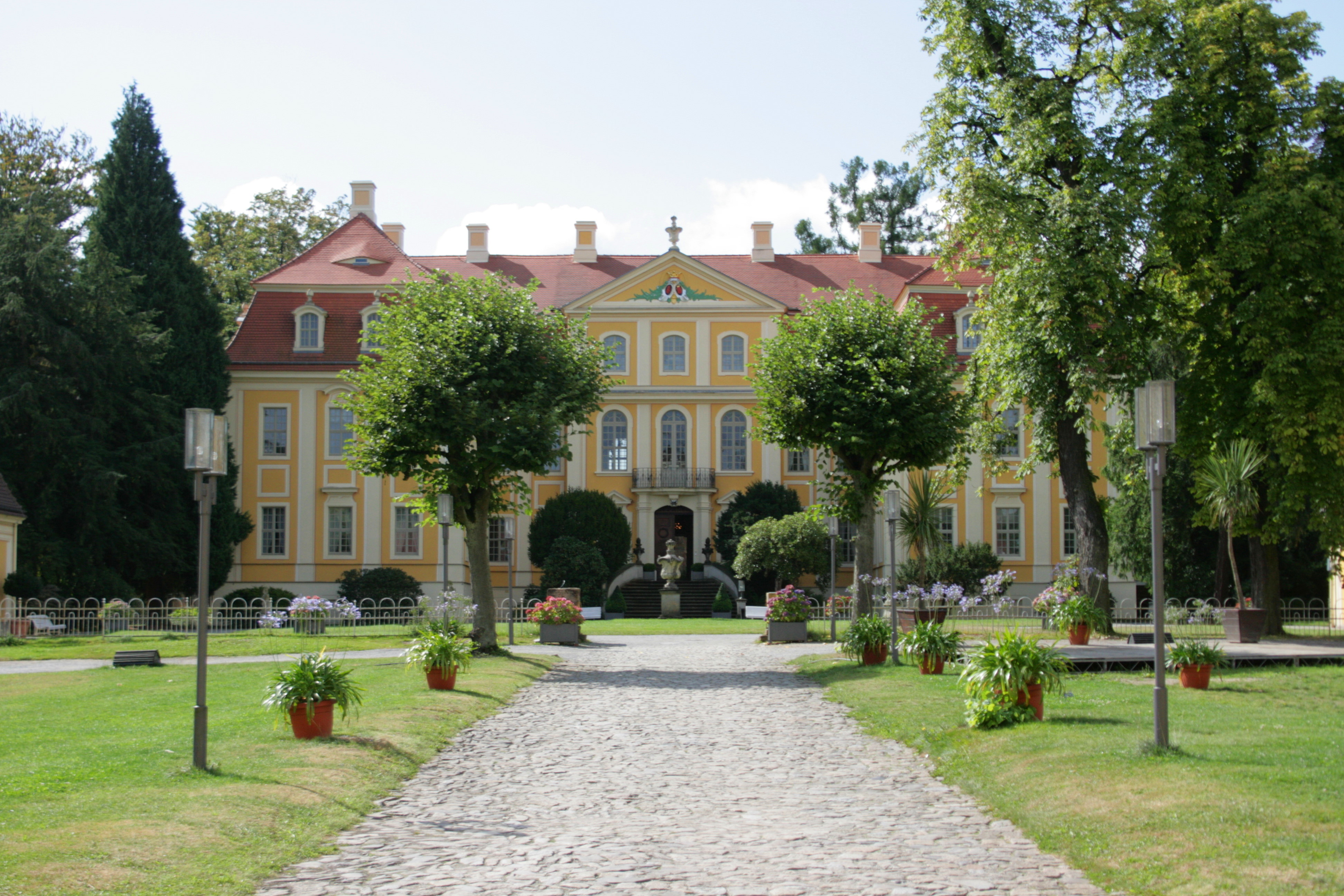 Barockschloss Rammenau in Rammenau